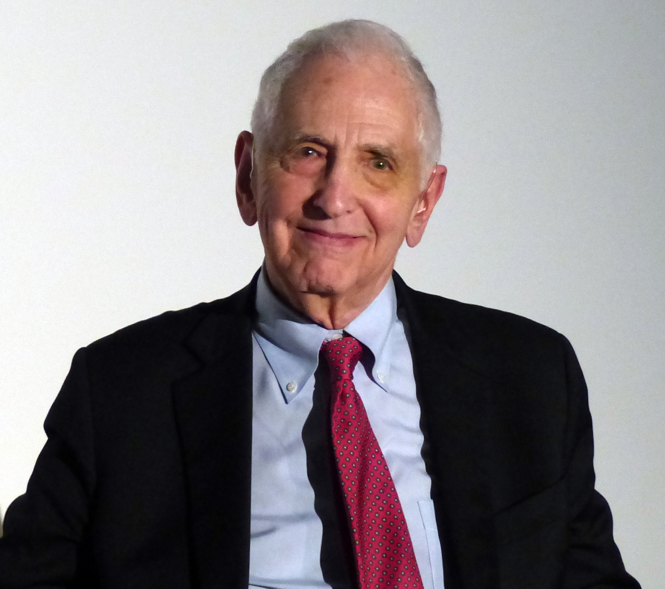 Daniel Ellsberg in Dresden anlässlich seiner Auszeichnung mit dem Dresdner Friedenspreis am 21.2.2016